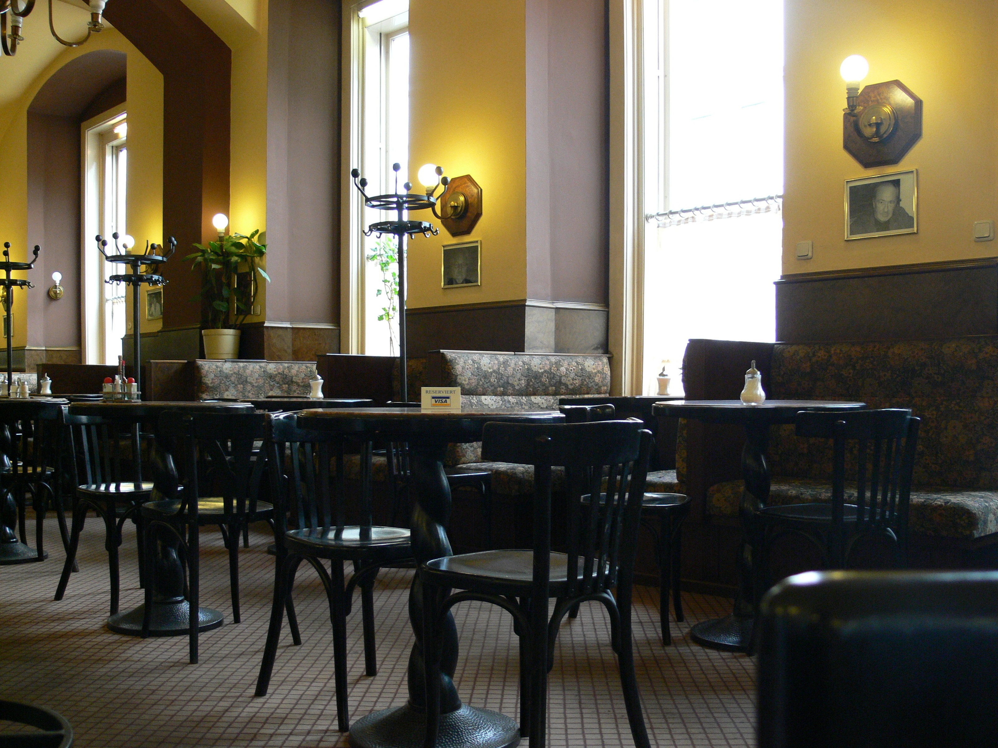 Café Eiles Josefstädter Straße 2, Wien